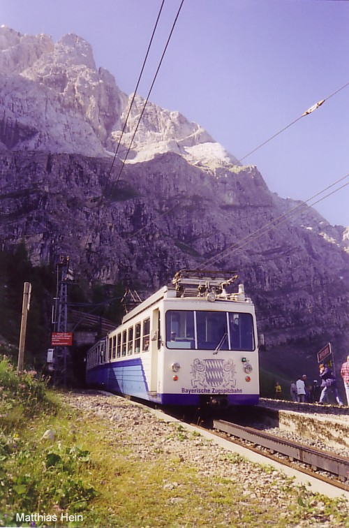 Triebwagen der Bayerischen Zugspitzbahn BZB (Meterspur Adhäsions- und Zahnradbahn) Station Riffelriss 1639m, im August 1998.